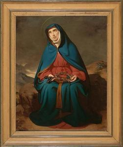 Claudio Lorenzale. Virgen de los Dolores. Madrid, Colección particular.